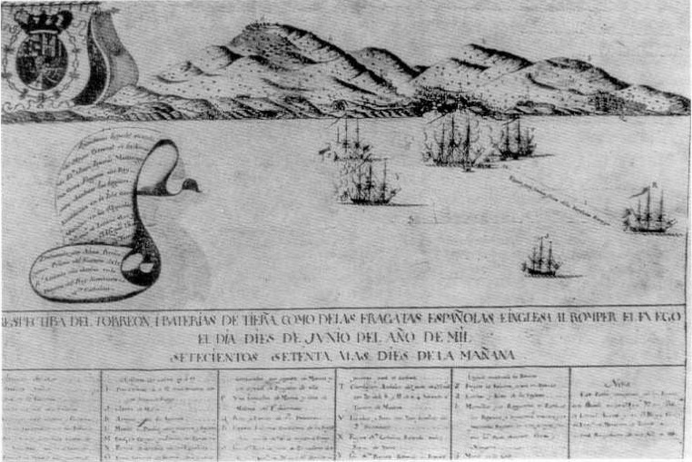 Batalla de las Malvinas entre las fuerzas al mando de Juan Ignacio de Madariaga Aróstegui y las inglesas en junio de 1770. Grabado de la época.